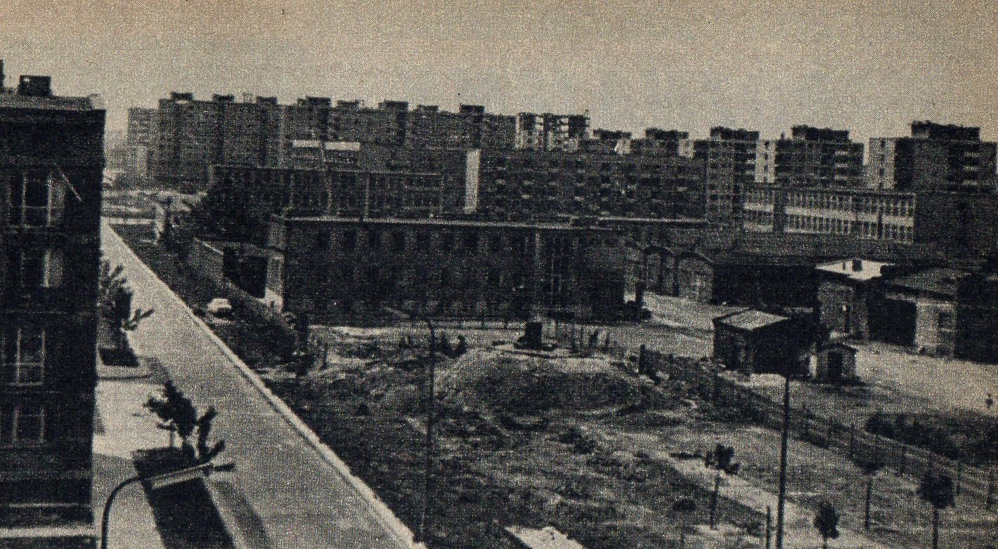 Warszawa. Muranów. Róg Zamenhofa i Miłej. 1964r. Fot. Krzysztof Różyc.